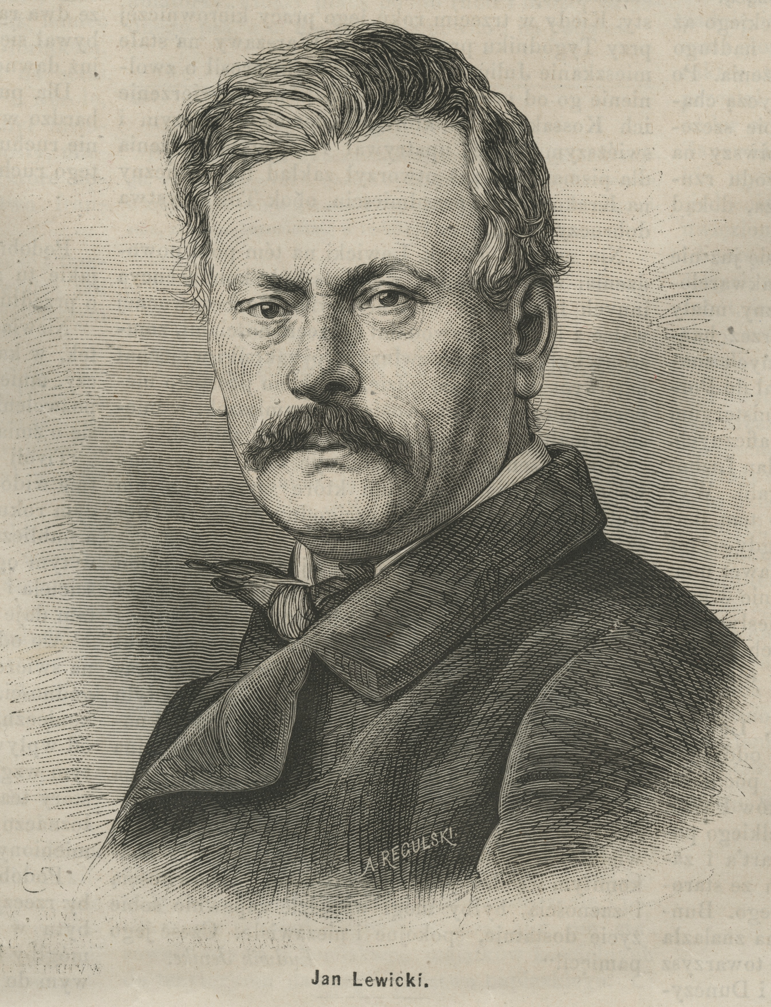 Jan [Nepomucen] Lewicki